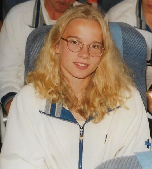 Johanna Halkoaho lentokoneessa matkalla yleisurheilun Euroopan-mestaruuskilpailuihin Budapestiin 17. elokuuta 1998.